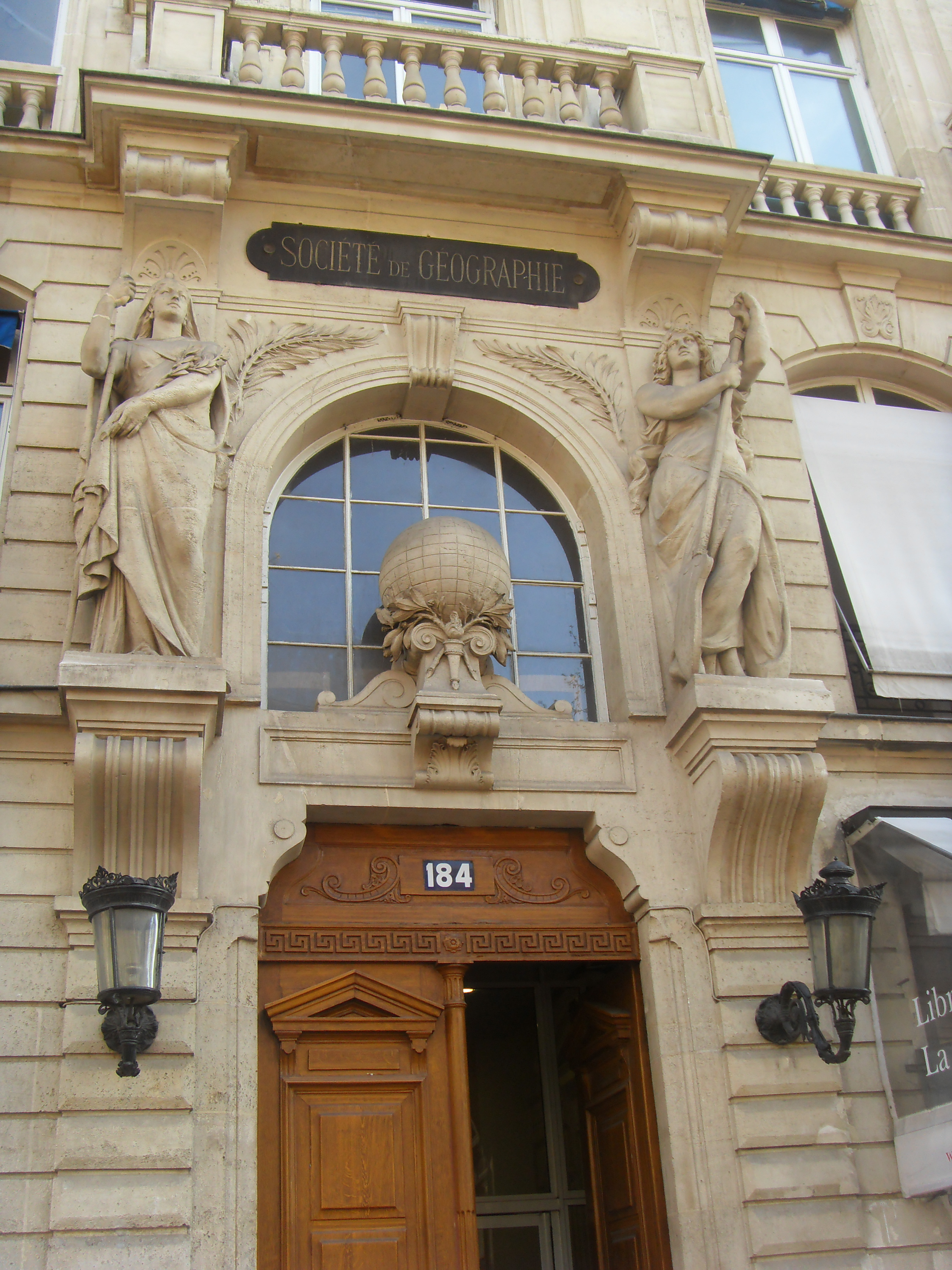 Société de géographie, 184 boulevard Saint-Germain, Paris. no 184 : Immeuble construit en 1878 par l'architecte Édouard Leudière pour la Société de géographie. Les deux cariatides, représentant la Terre et la Mer, et le globe terrestre en façade ont été sculptés par Émile Soldi.